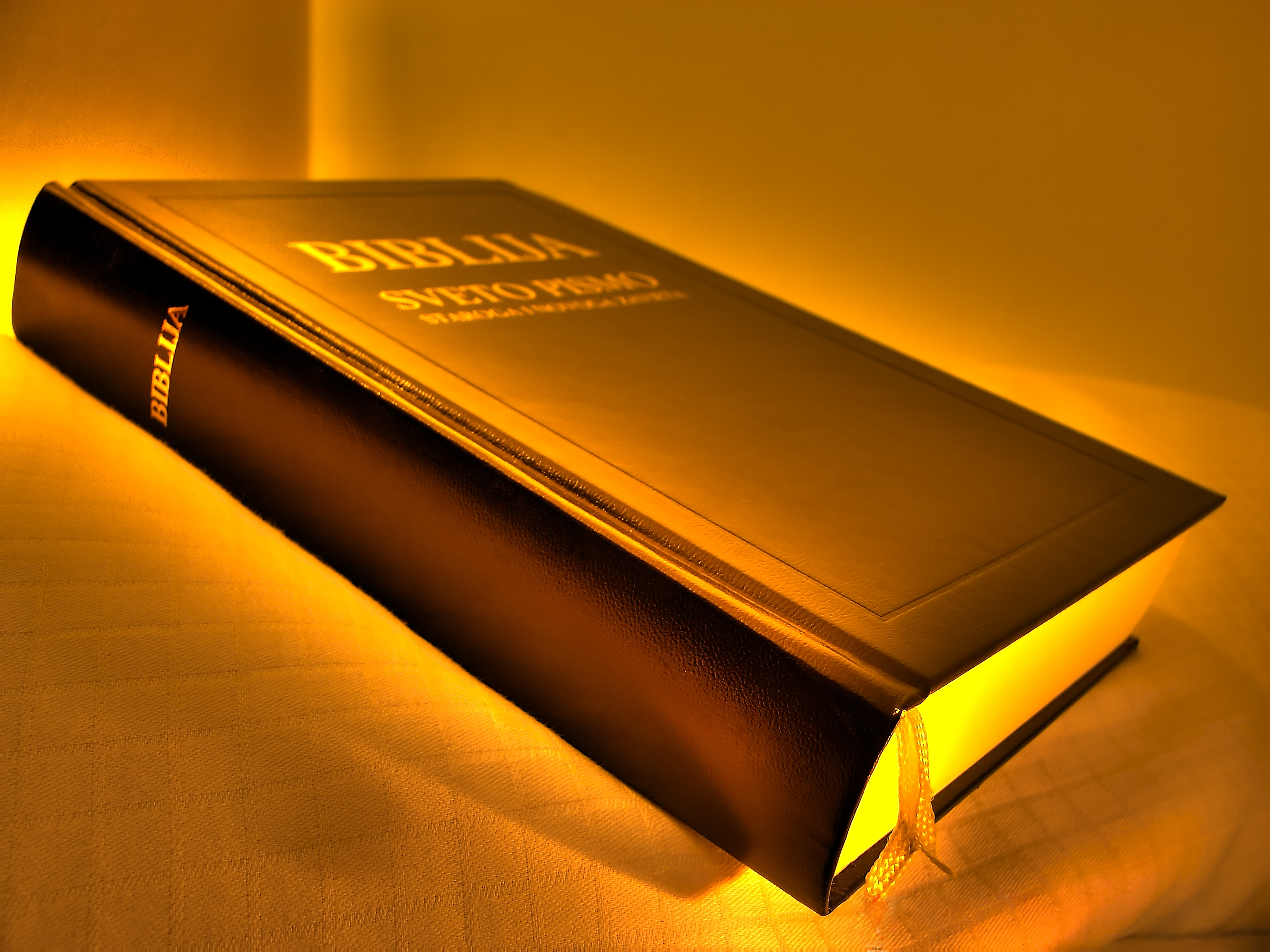 Biblija - sveto pismo staroga i novoga zavjeta